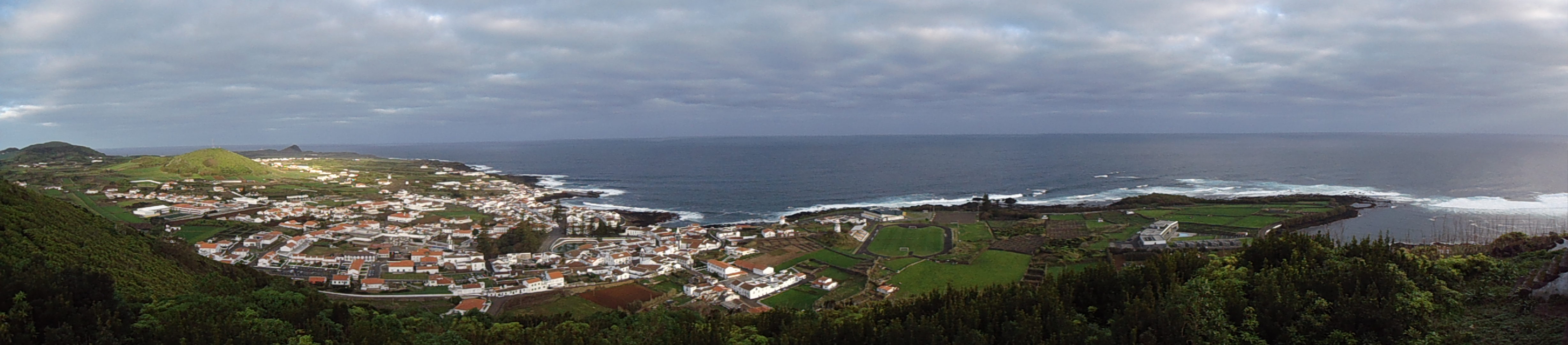 Santa Cruz da Graciosa, vista panorâmica a partir do alto da Ermida de Nossa Senhora da Ajuda.